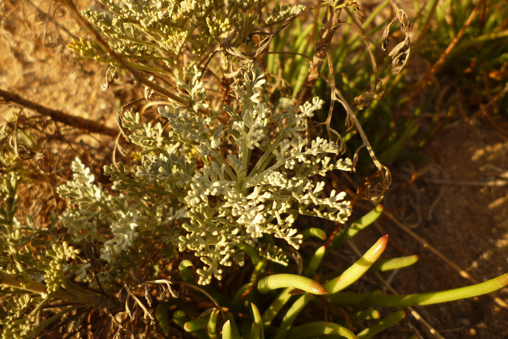 Artemisia gallica en La Manga del Mar Menor, España.